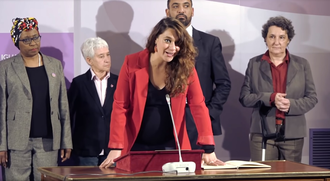 Vive desde dentro cómo fue el día en que el Ministerio de Igualdad echó a andar tras los pasos de la ministra Irene Montero.